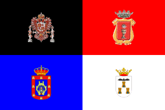 Primera edición de la bandera de La Mancha, del año 1906 (con los cuatro escudos provinciales)